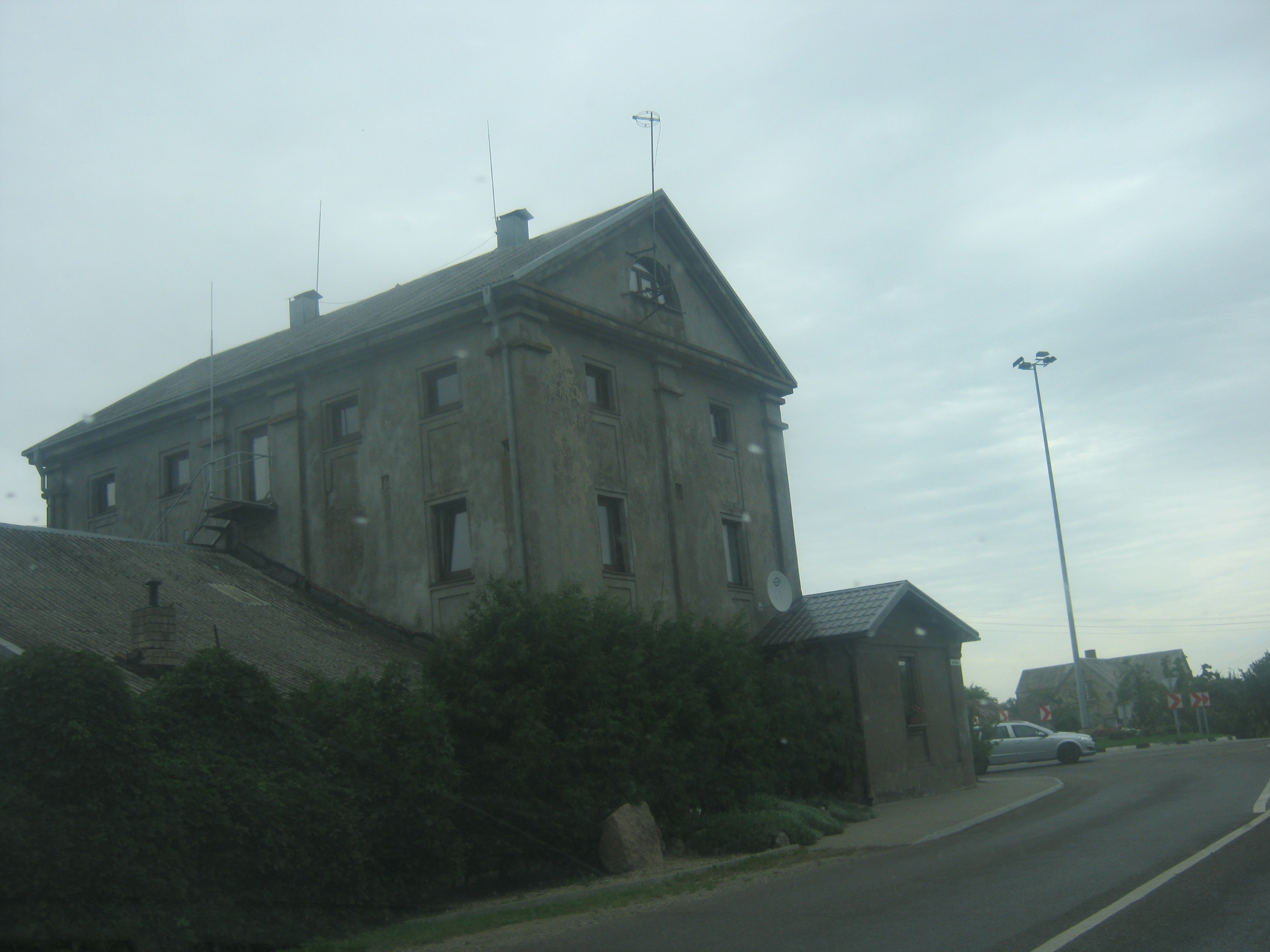 Krosna